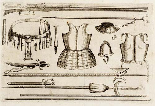 Вооружение московского солдата (мушкетера и пикинера) середины XVII века: мушкет; сошка; мини-жаровня с горячими углями (для поджога фитиля); перевязь с натрусками, пороховницей и обмотанными вокруг нее фитилями; мешочек для пуль; латы и каска («шишак»); кожаный нагрудник (под кирасу); палаш; шпага; алебарда; протазан; пики. Гравюра из книги: "Учение и хитрость воинского строя", М., 1649